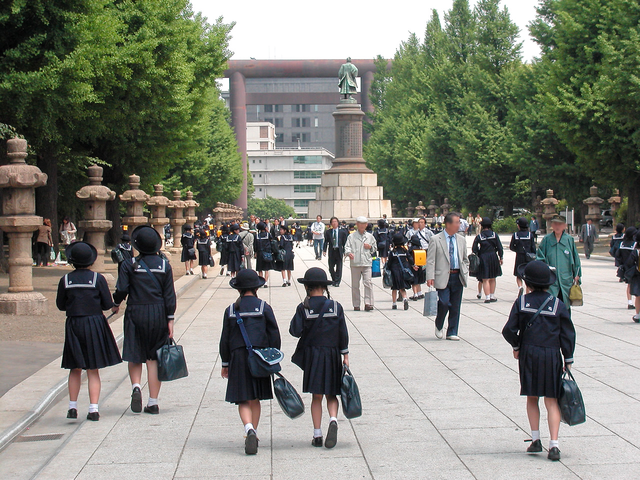 Students at Yasukuni shrine